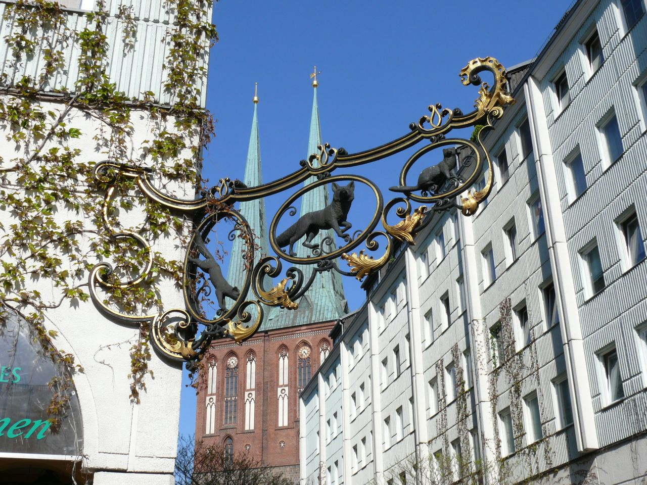 Berlin im Nikolaiviertel